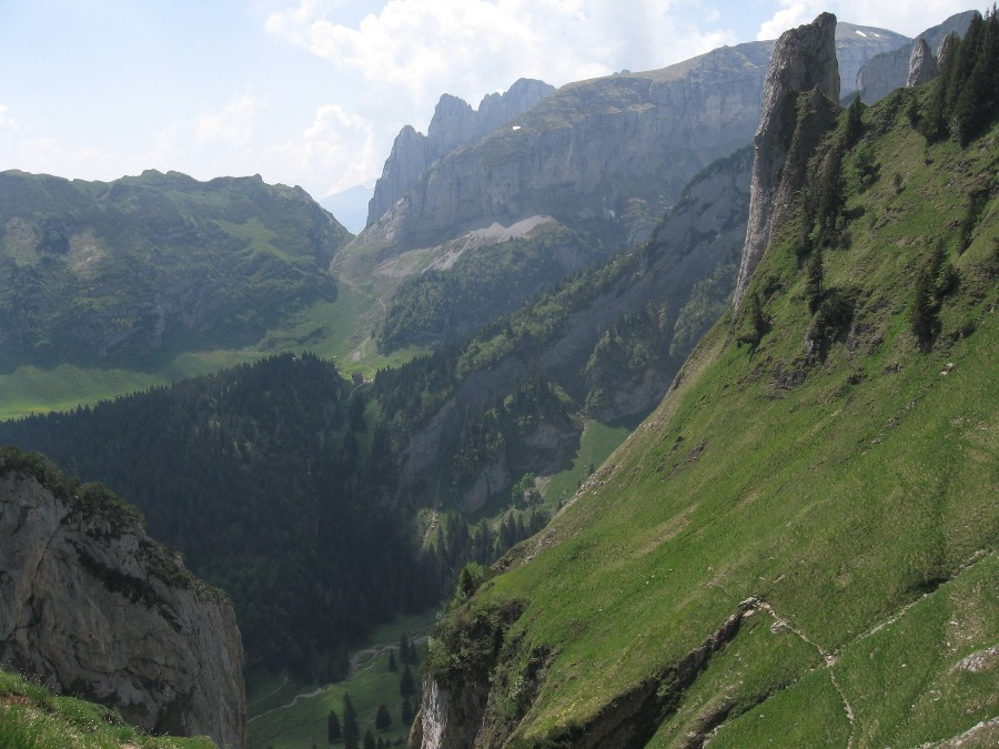 Die Saxer Lücke, gesehen von Norden, von der Bogartenlücke, in der Linie des Sax-Schwende-Bruches, Alpsteinmassiv, Appenzell-Innerrhoden, Schweiz.